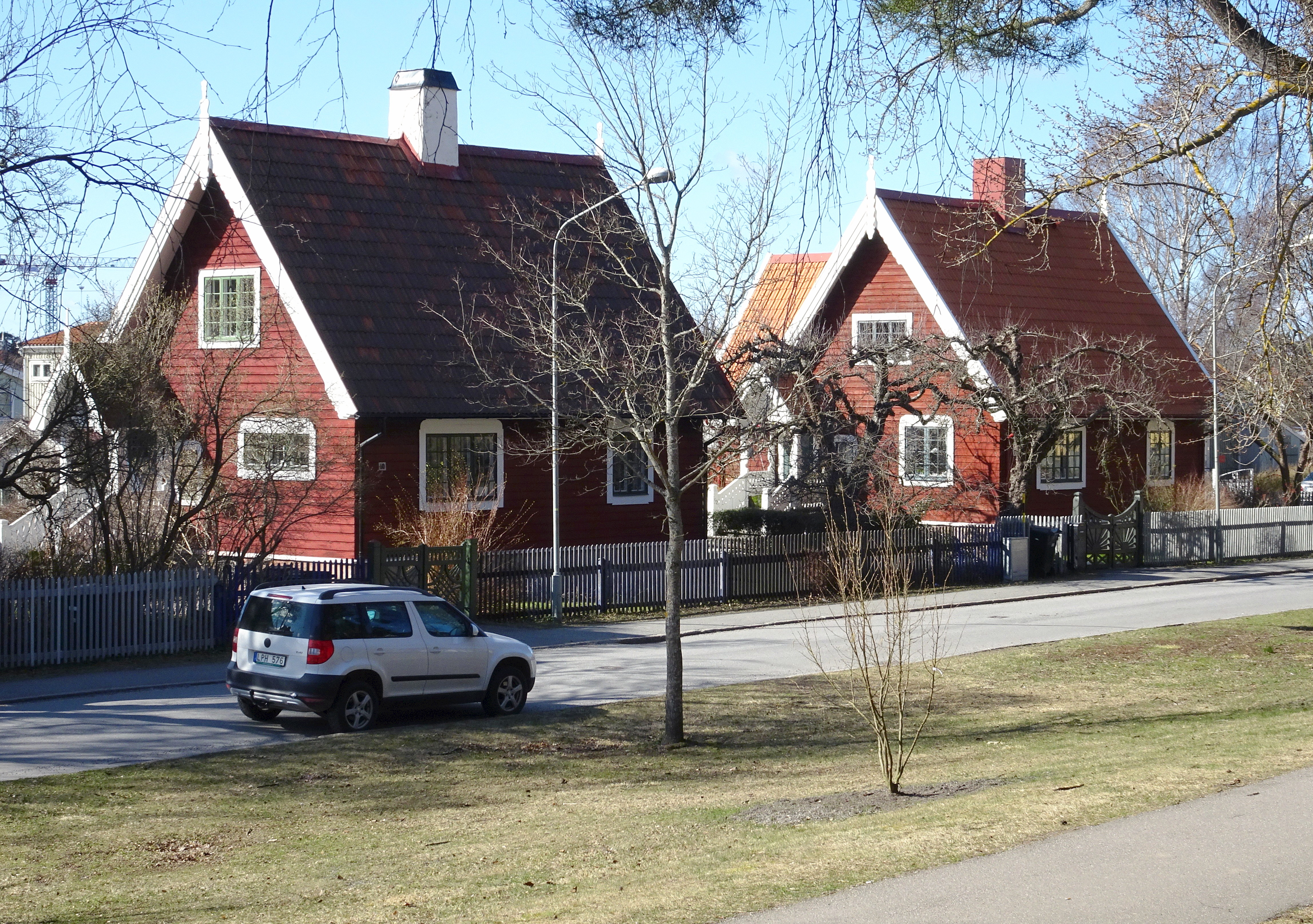 Gamla Enskede Margaretavägen 60 (närmast) och 58. Villa, 1½ vånings trähus, typhus VIII, arkitekt Carl Alfred Danielsson-Bååk, byggår 1909.